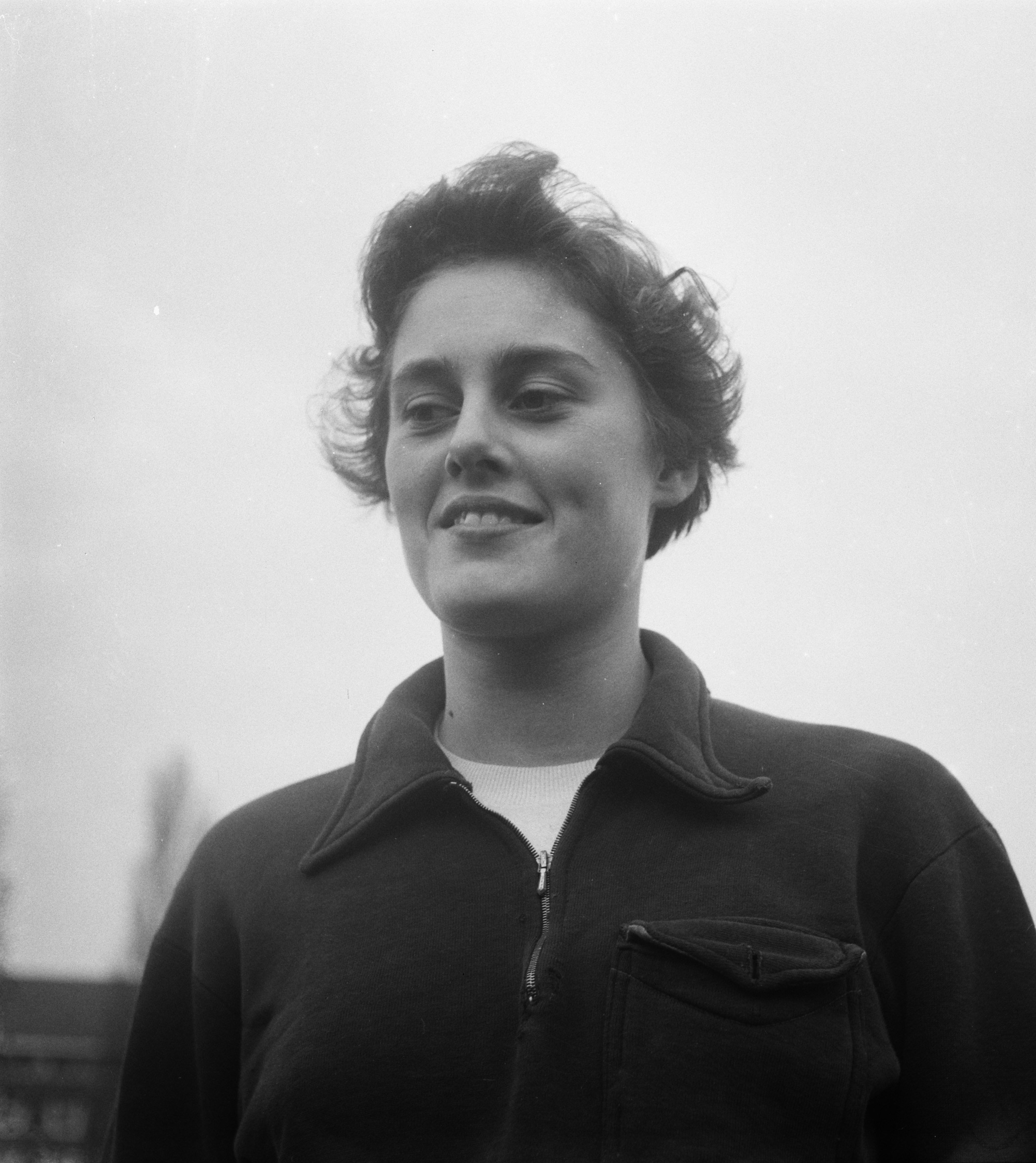 Collectie / Archief : Fotocollectie Anefo Reportage / Serie : [ onbekend ] Beschrijving : Willy Lust (atletiek, verspringen) Annotatie : Geselecteerd voor de Olympische Spelen van Helsinki Datum : 9 april 1952 Trefwoorden : atleten, portretten Persoonsnaam : Lust, Willy Fotograaf : Noske, J.D. / Anefo Auteursrechthebbende : Nationaal Archief Materiaalsoort : Negatief (zwart/wit) Nummer archiefinventaris : bekijk toegang 2.24.01.03 Bestanddeelnummer : 905-0453